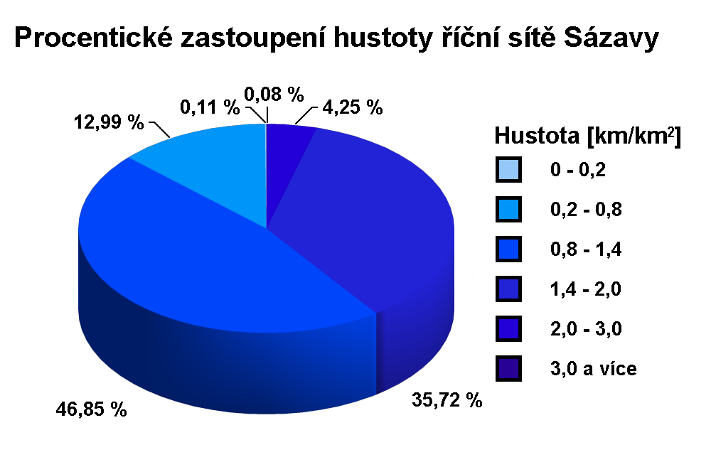 Procentické zastoupení hustoty říční sítě Sázavy